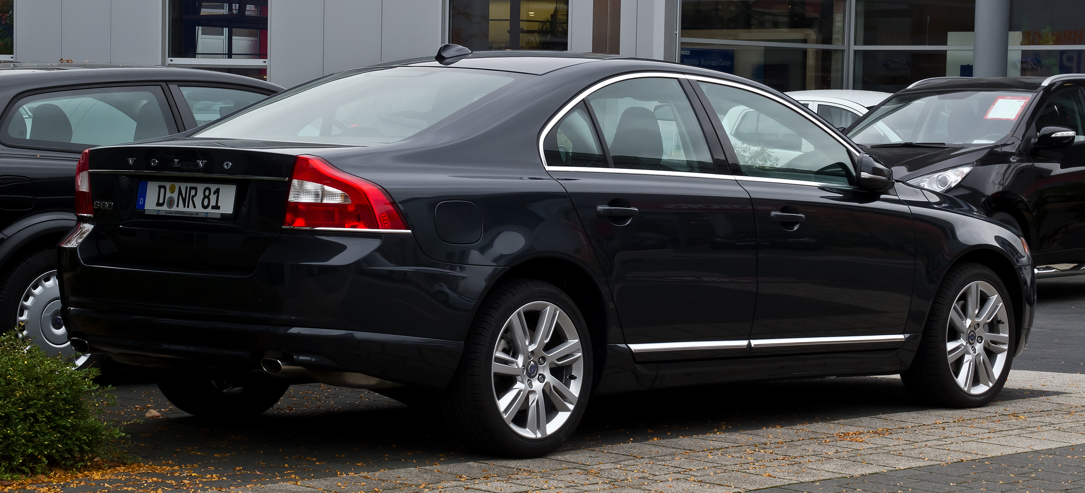 Volvo S80 D5 Momentum (II, Facelift)